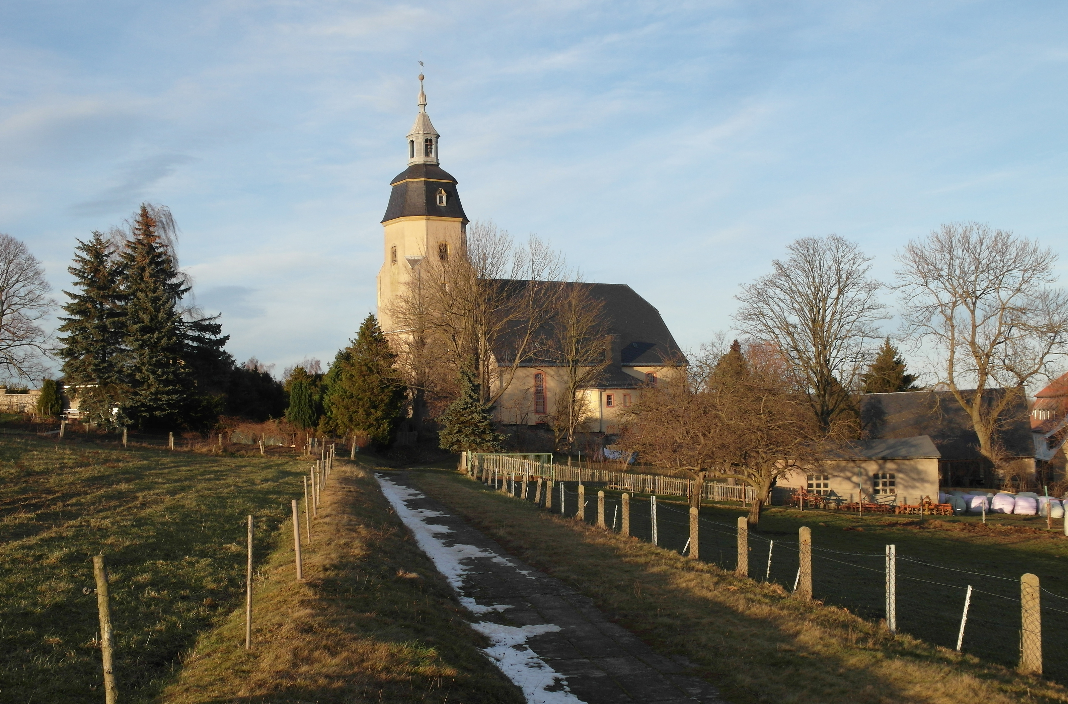 Großhartmannsdorf: Evangelische Dorfkirche (GMP: 50.796712,13.317437). Barocke Saalkirche von 1737/38. Sicht von Süden. Im Vordergrund, zur Kirche hin verläuft der mit Betonplatten abgedeckte Kohlbach Kunstgraben. Er wurde 1550-1570 über eine Länge von 12.197 m angelegt.